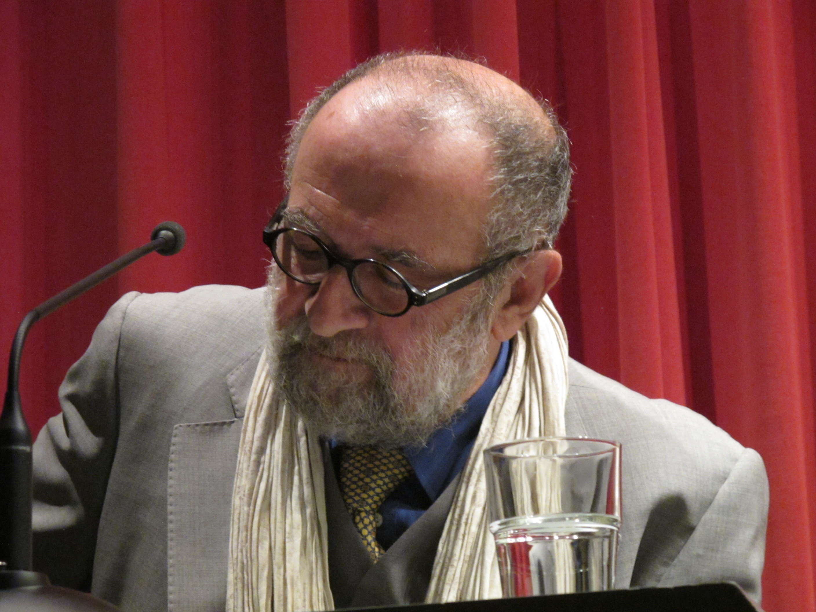 SAID bei der Präsentation von Außer.dem Nr 21 im Lyrikkabinett